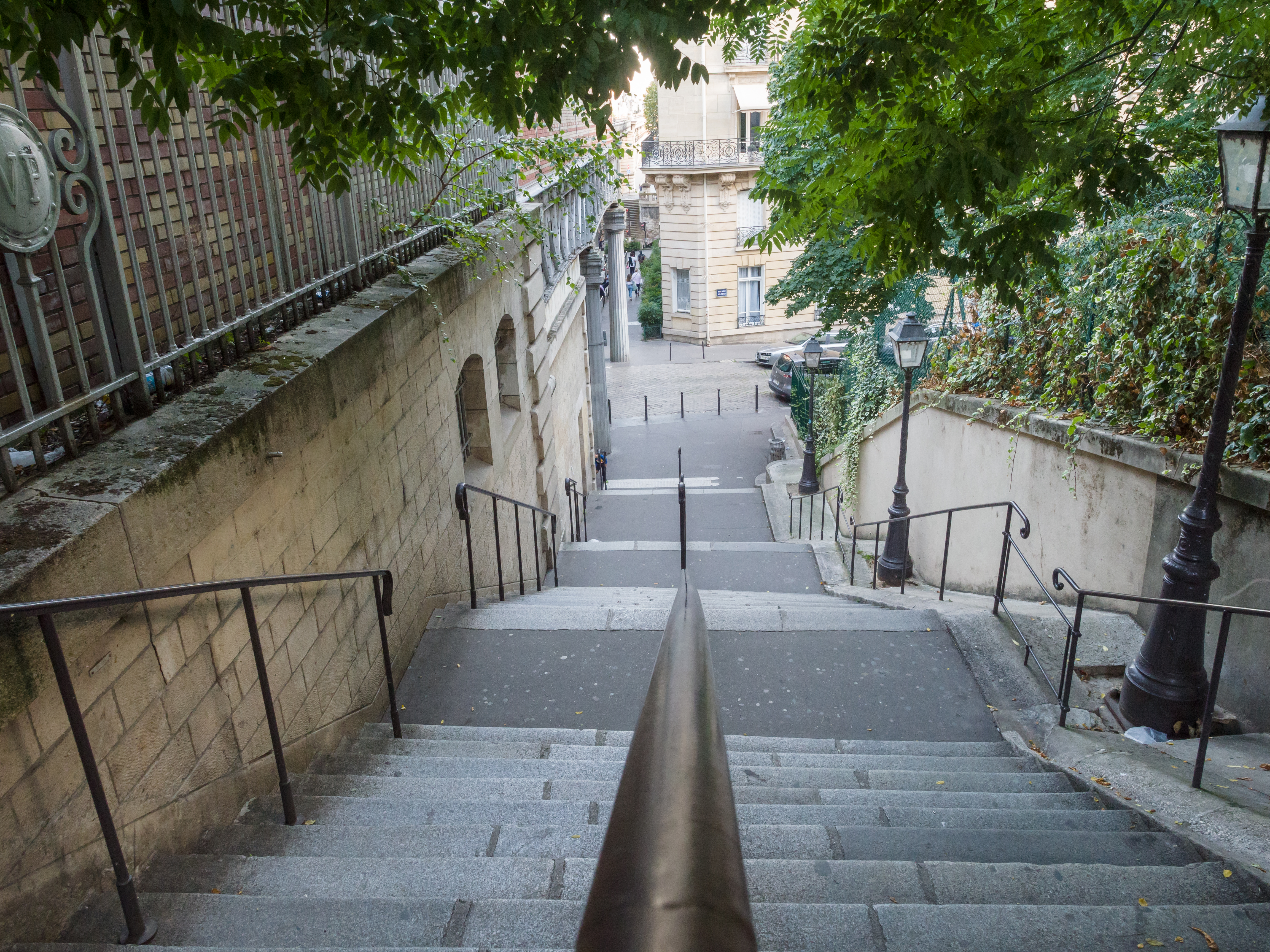 Paris